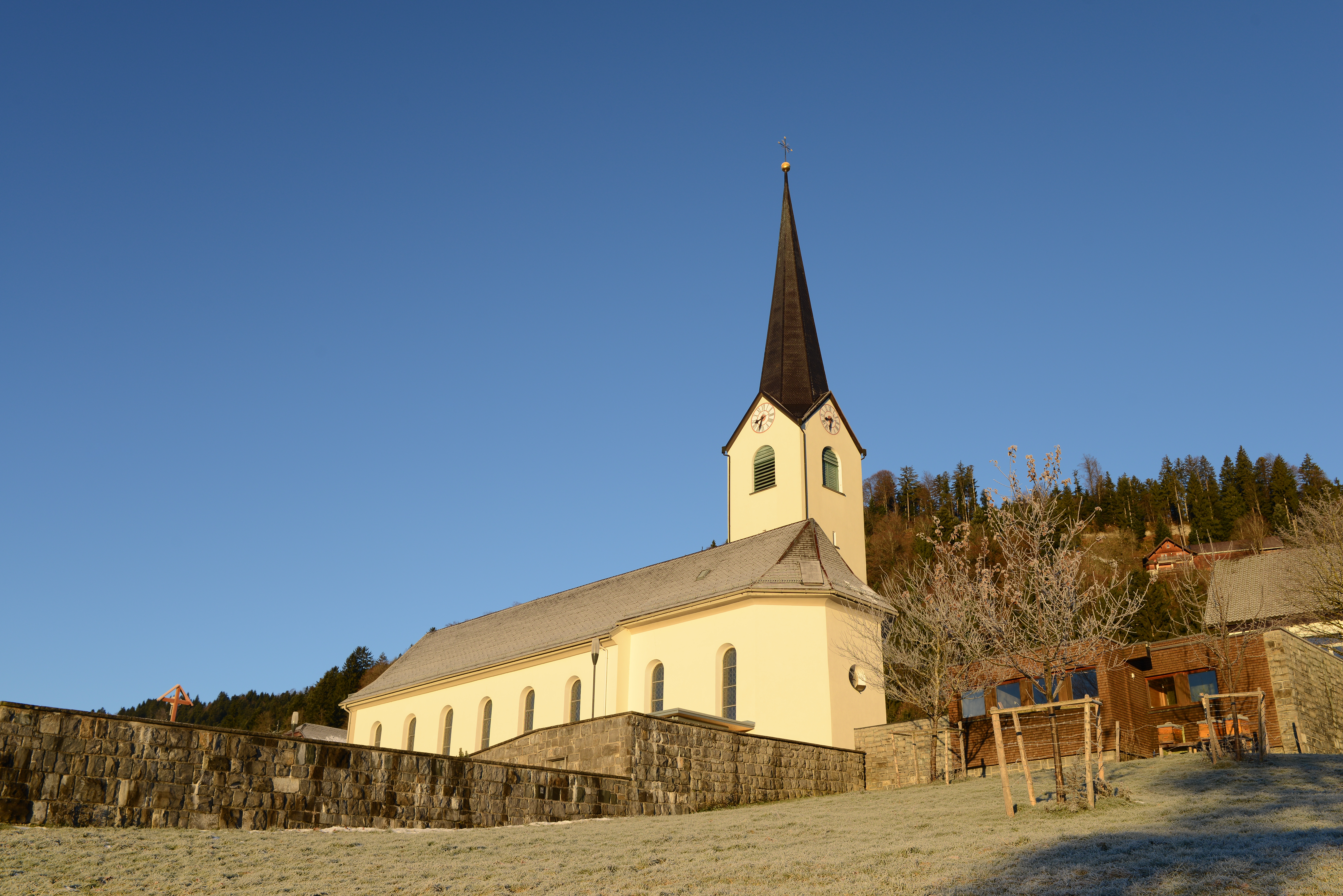 Pfarrkirche hl. Sebastian in Langen bei Bregenz in Vorarlberg.